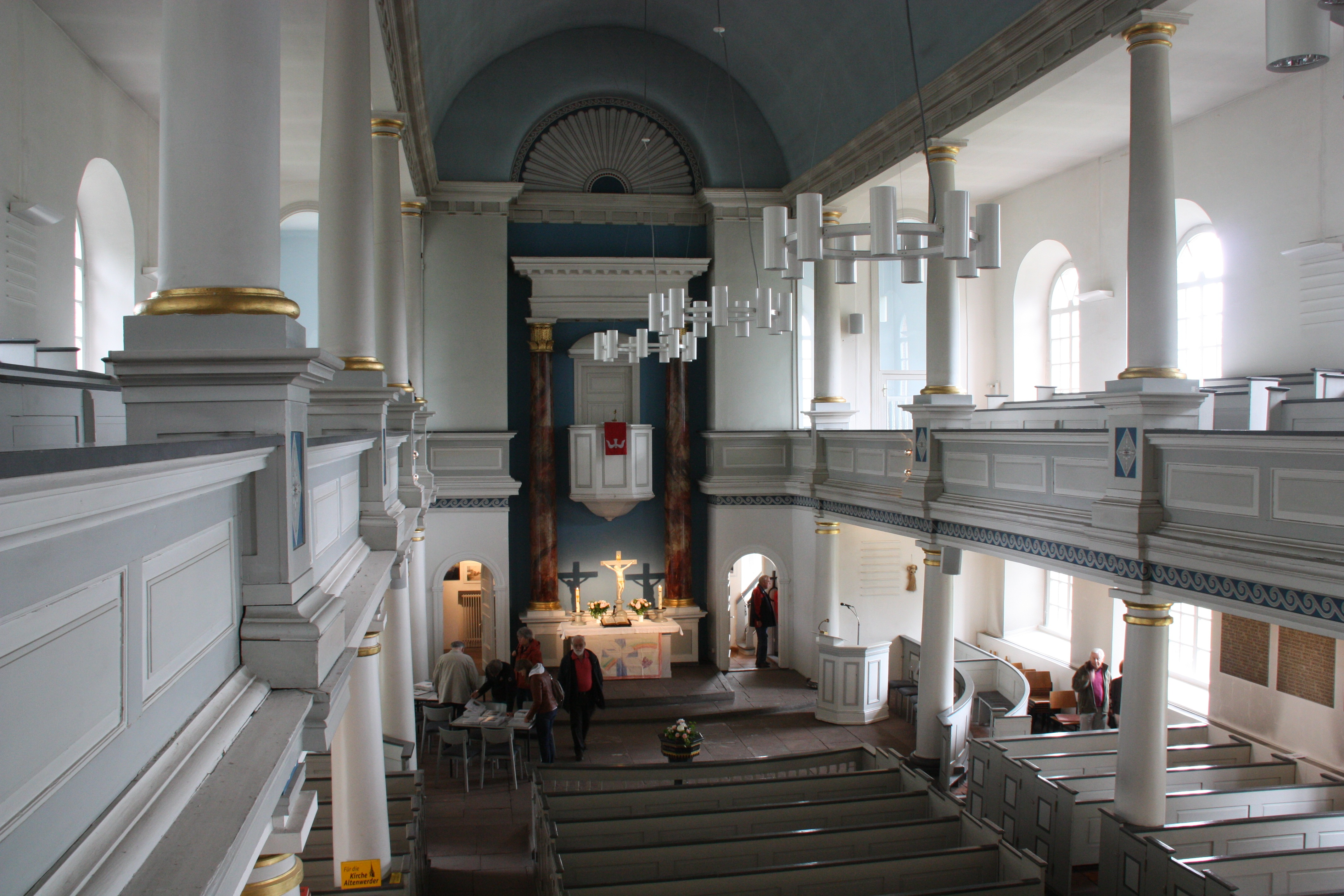 Hamburg, Altenwerder, Kirche St.Gertrud, Innenraum, Blick von der Empore